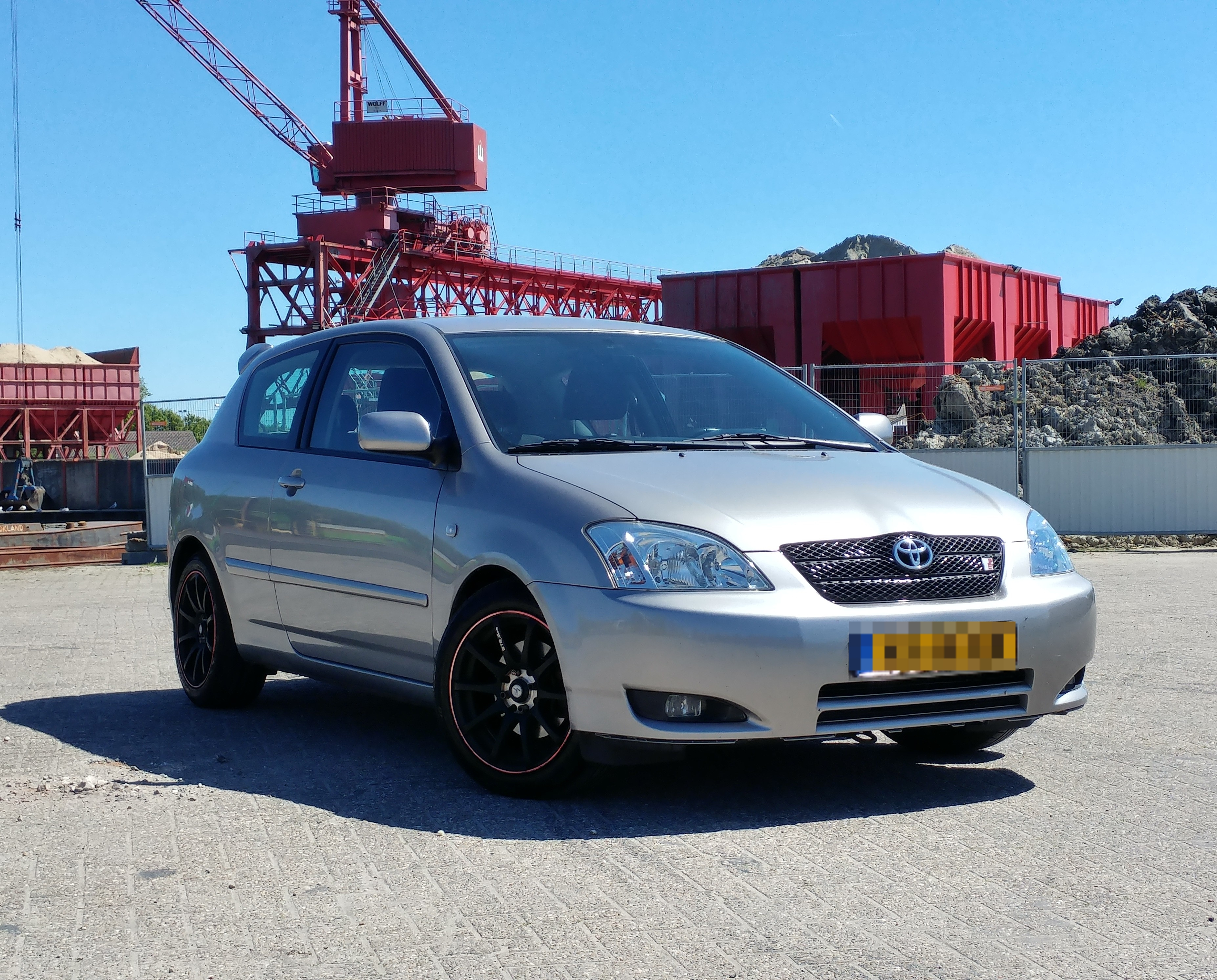 2002 Toyota Corolla T Sport 3-deurs 1D2 Quick Silver